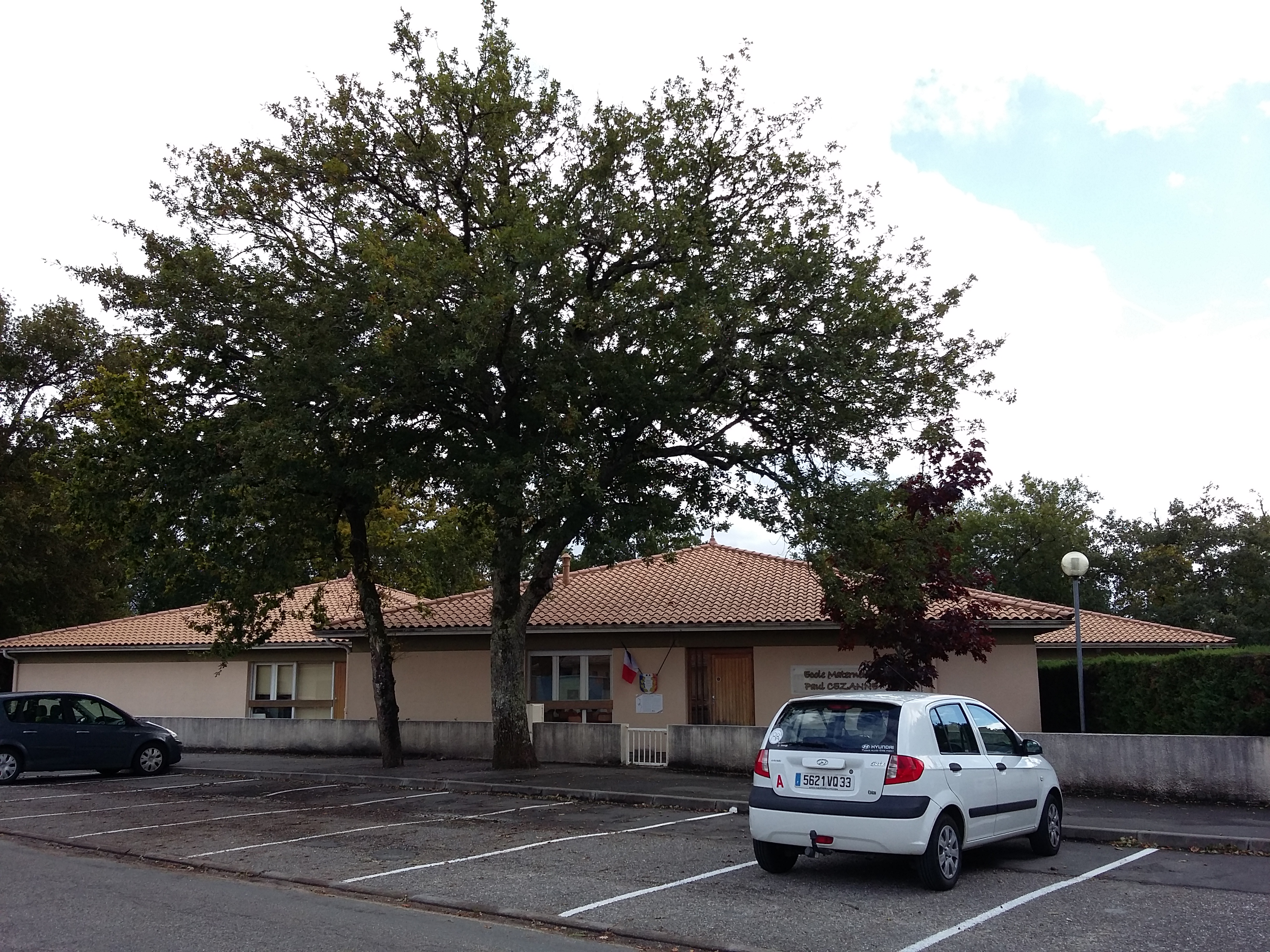 École maternelle Paul Cézanne de Saint-Jean-d'Illac.